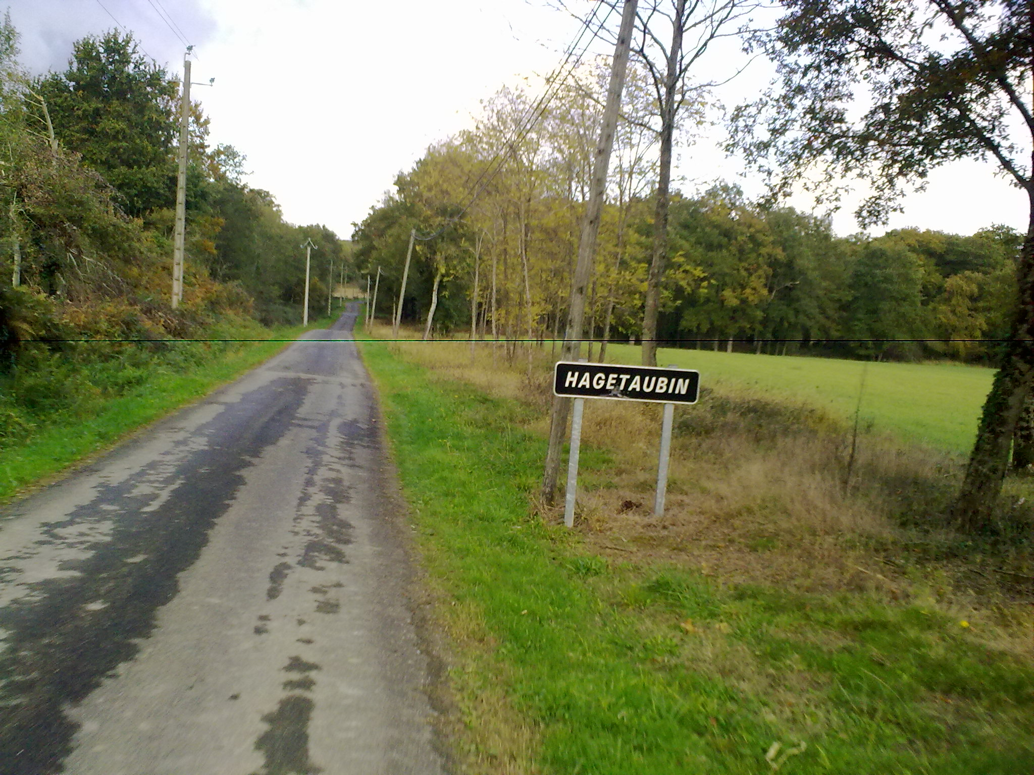 Hagetaubin